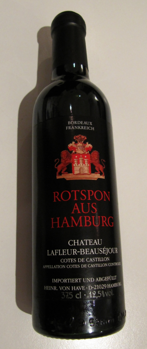 Kleine Flasche Rotspon (von Have, Bergedorf)